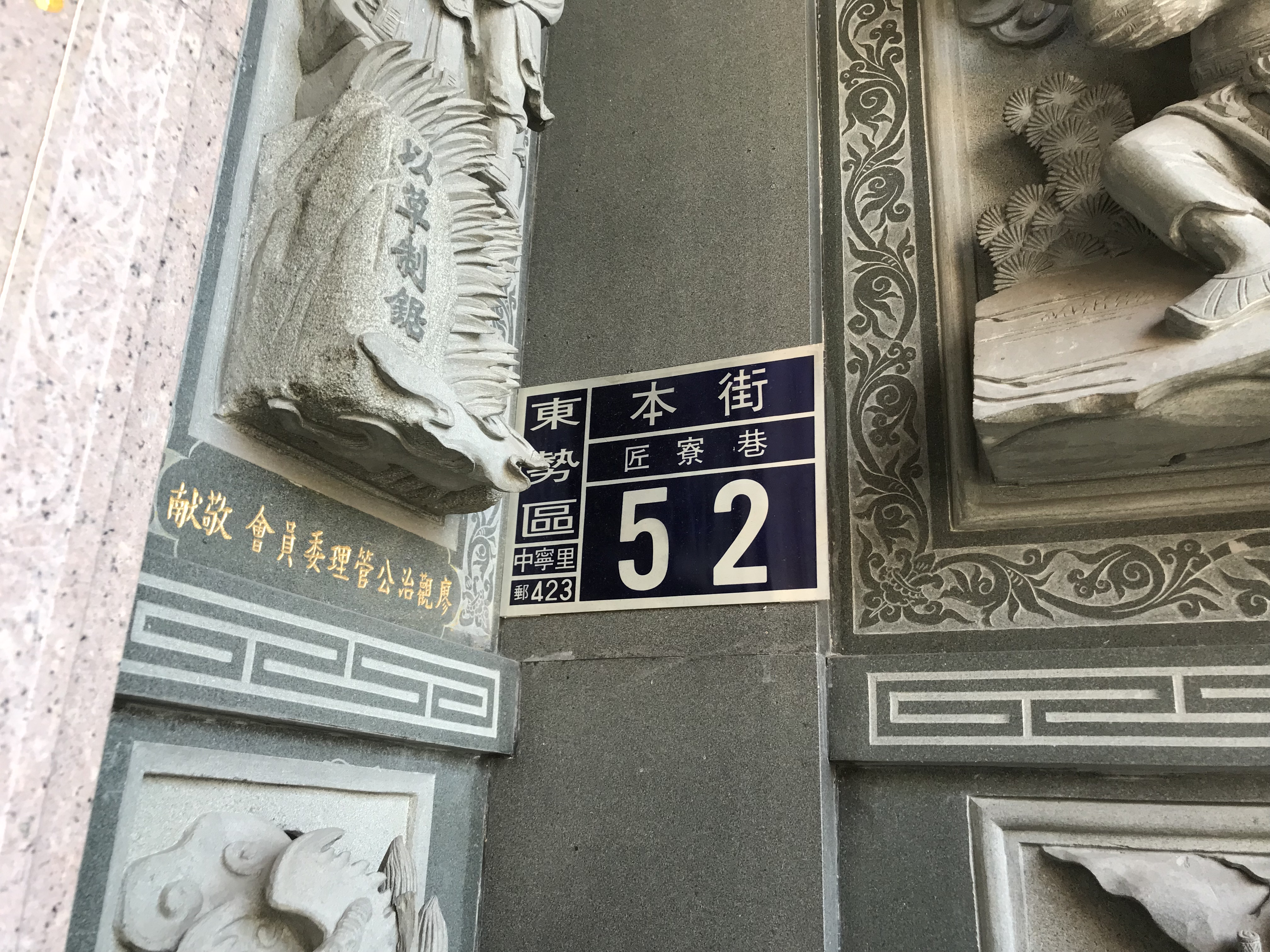 臺灣巧聖仙師東勢祖廟門牌